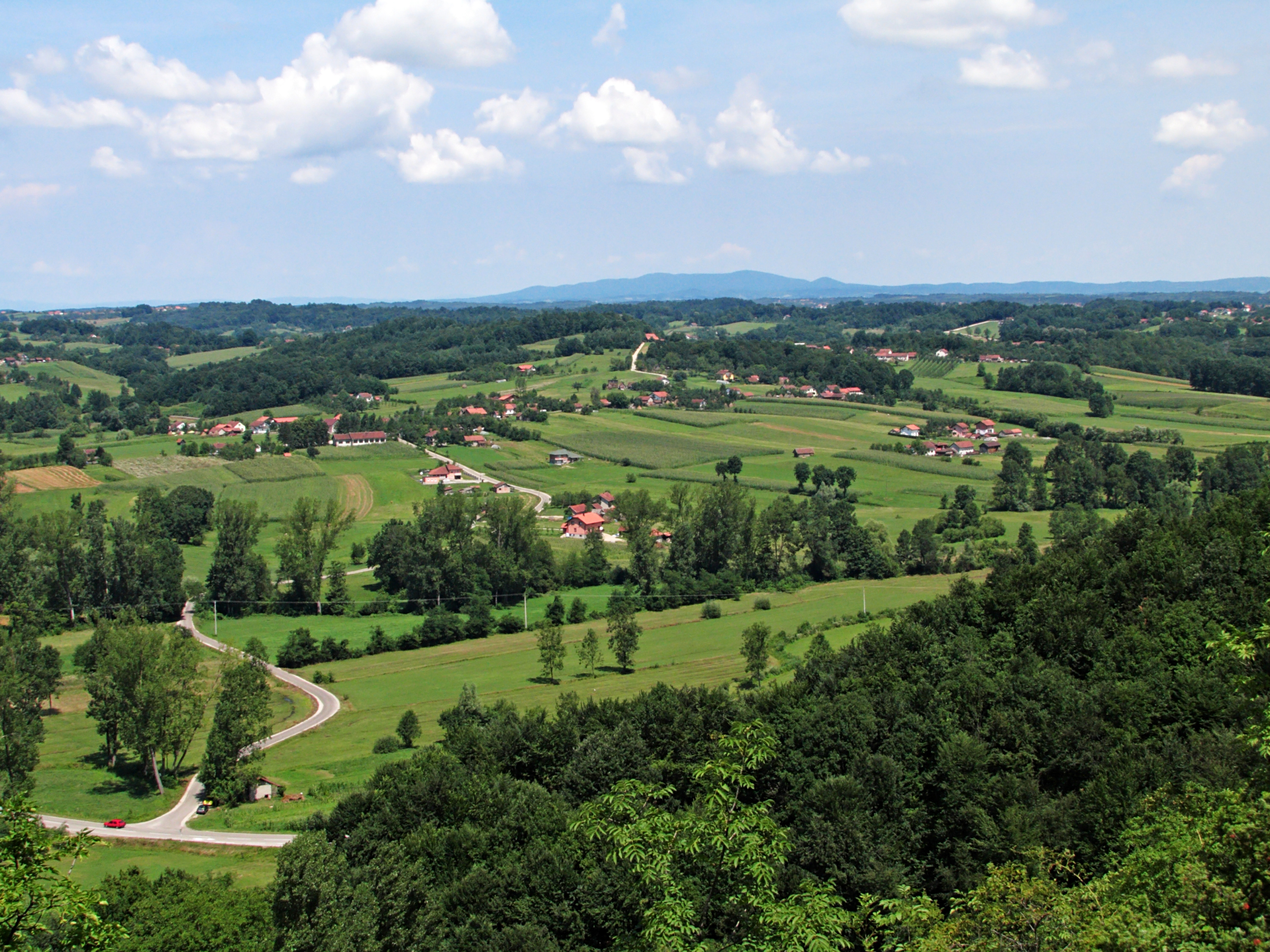 Дренова